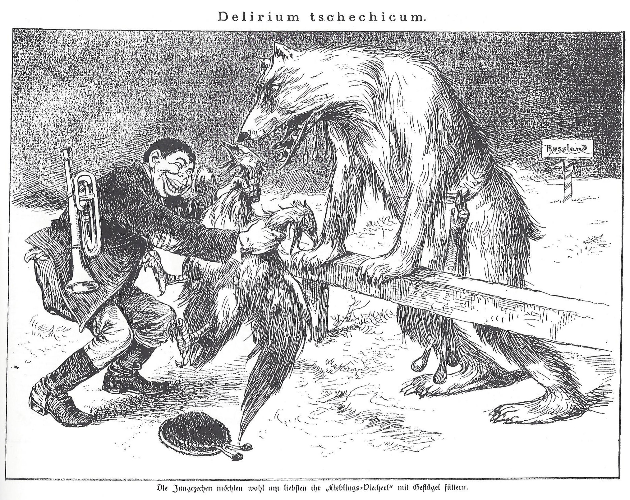 Karikatur der Jungtschechen, die in Russland die Stütze für ihr politisches Programm sahen. Dem russischen Bären wird der österreichische Doppeladler zum Fraß geboten.